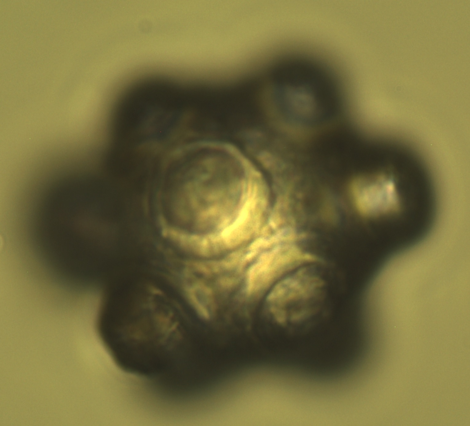 Fumaria officinalis Pollenkorn 400x